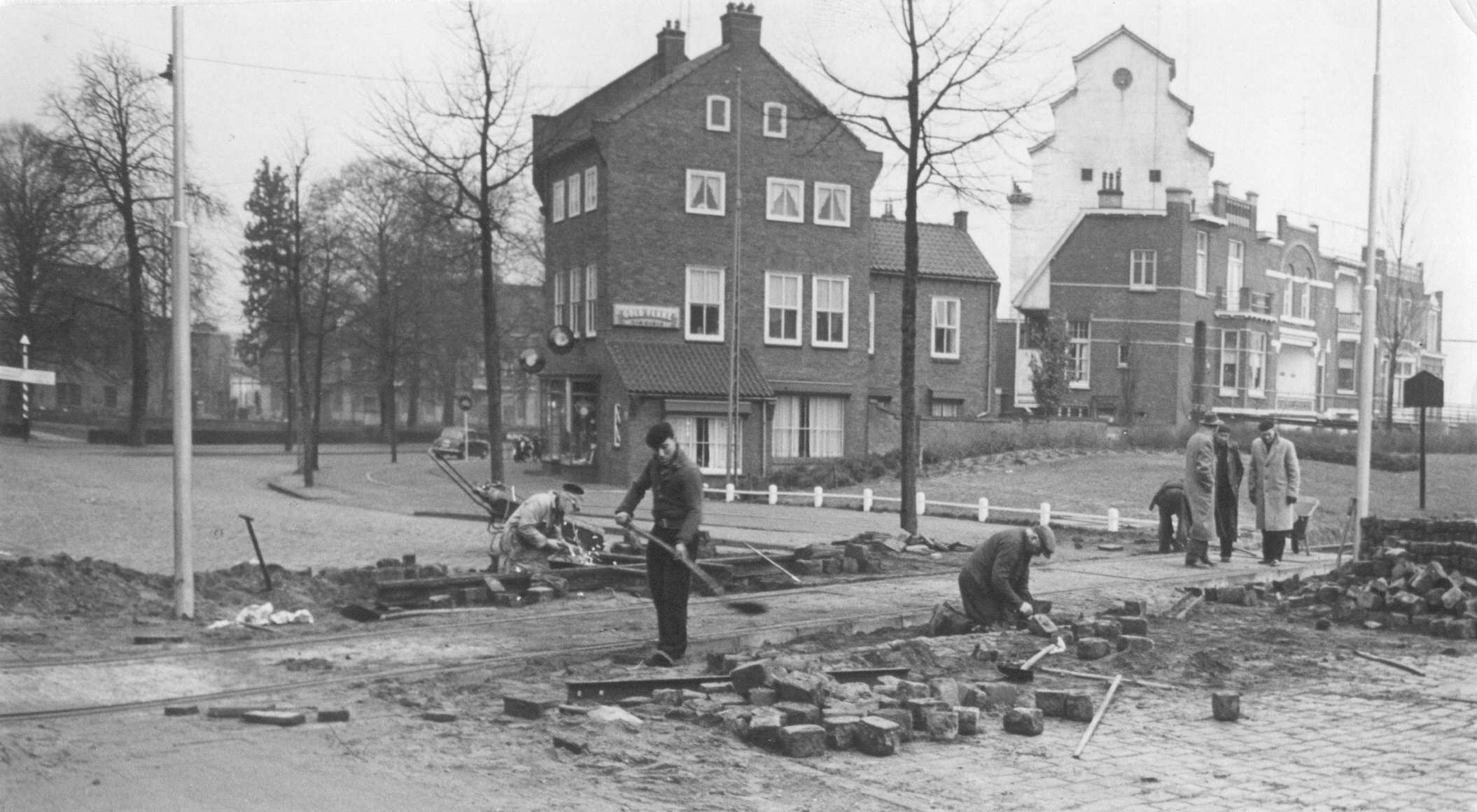 Reconstructiewerkzaamheden, gezien in de richting van het Krayenhoffpark. Links van het midden het begin van de Weurtseweg. Rechts panden aan de Waalbandijk